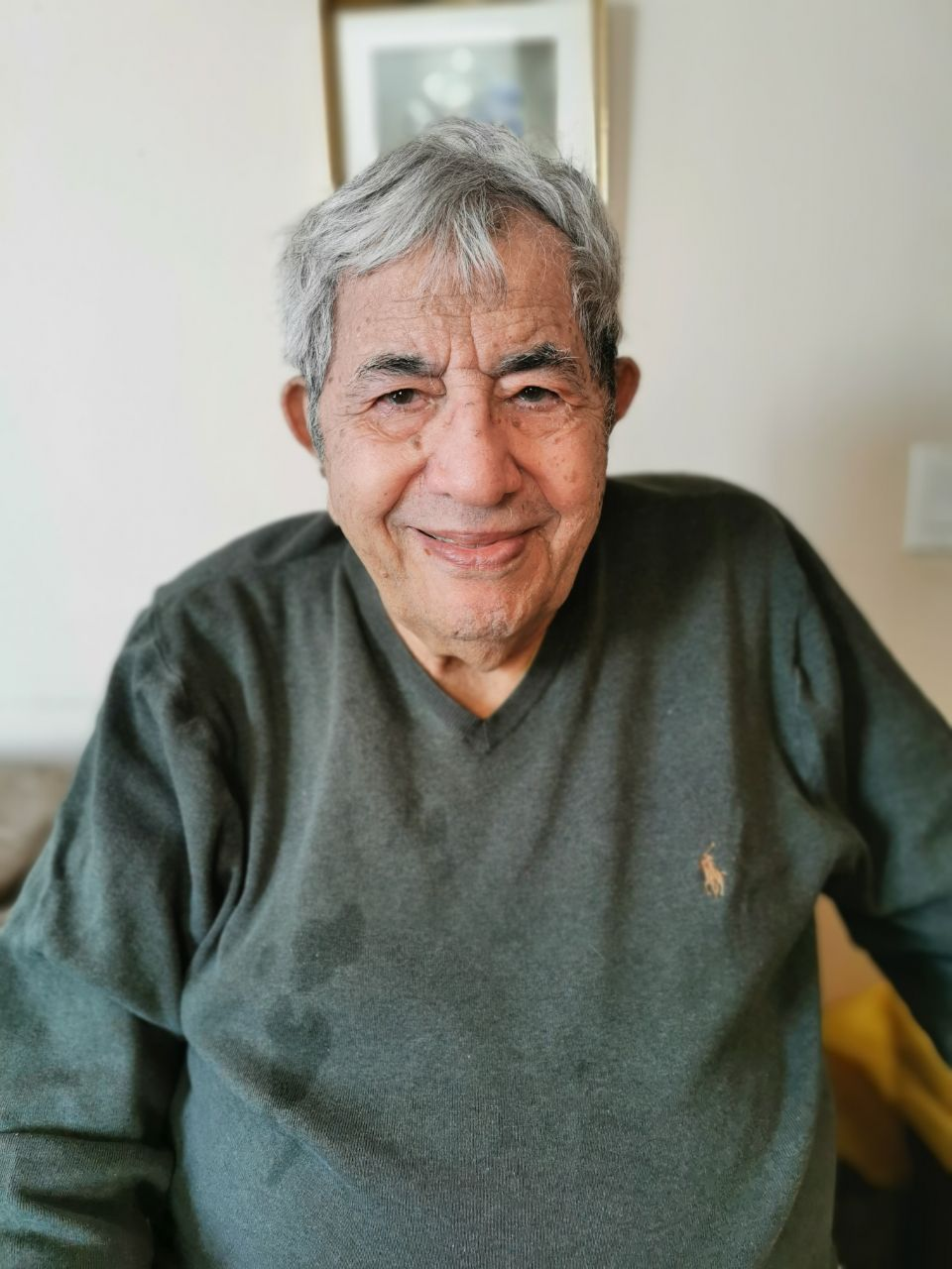 عکسی از عباس جوانمرد در منزل شخصی‌اش در تورنتو